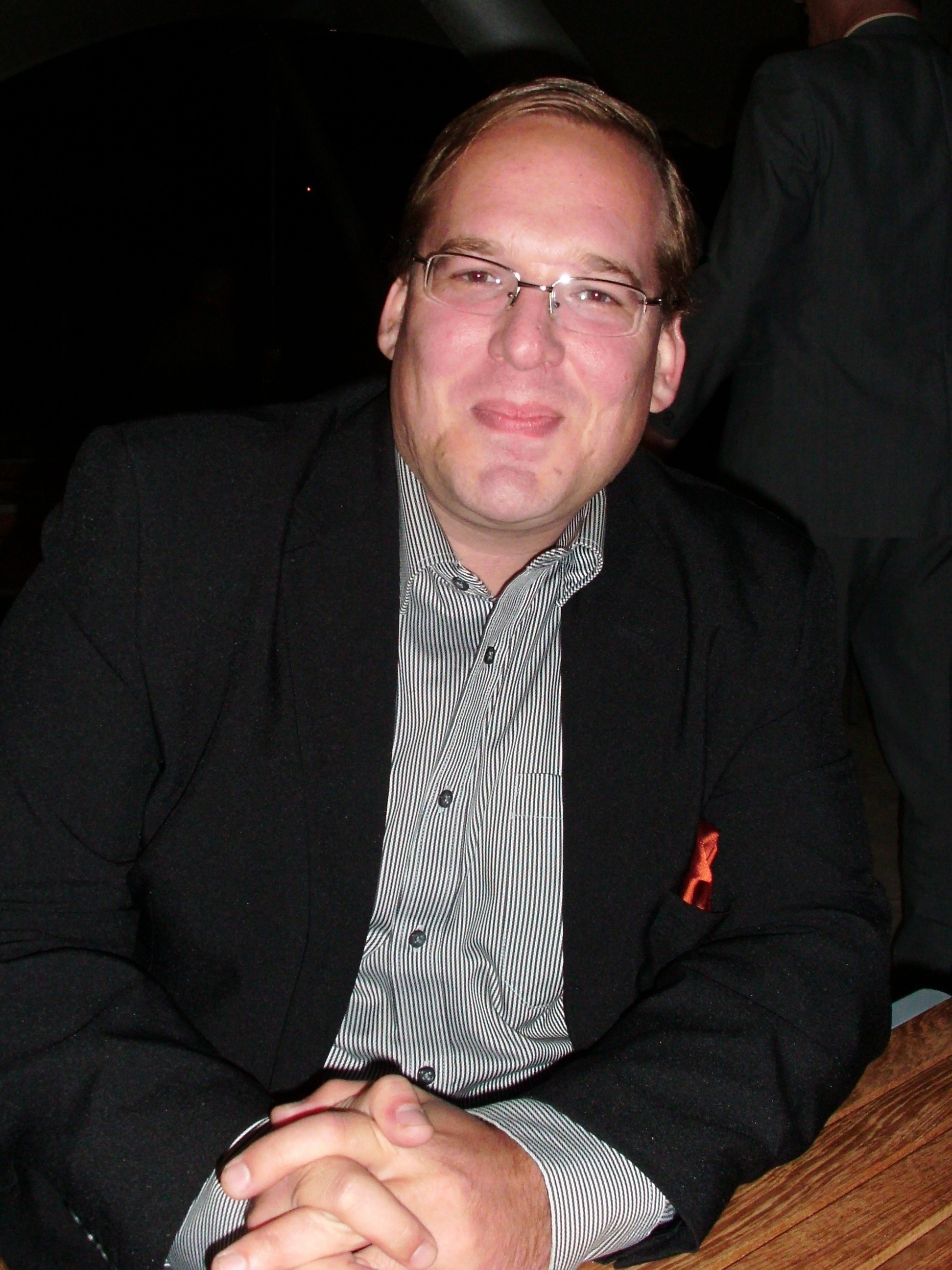 Filip Albrecht in Letohrad, 2012